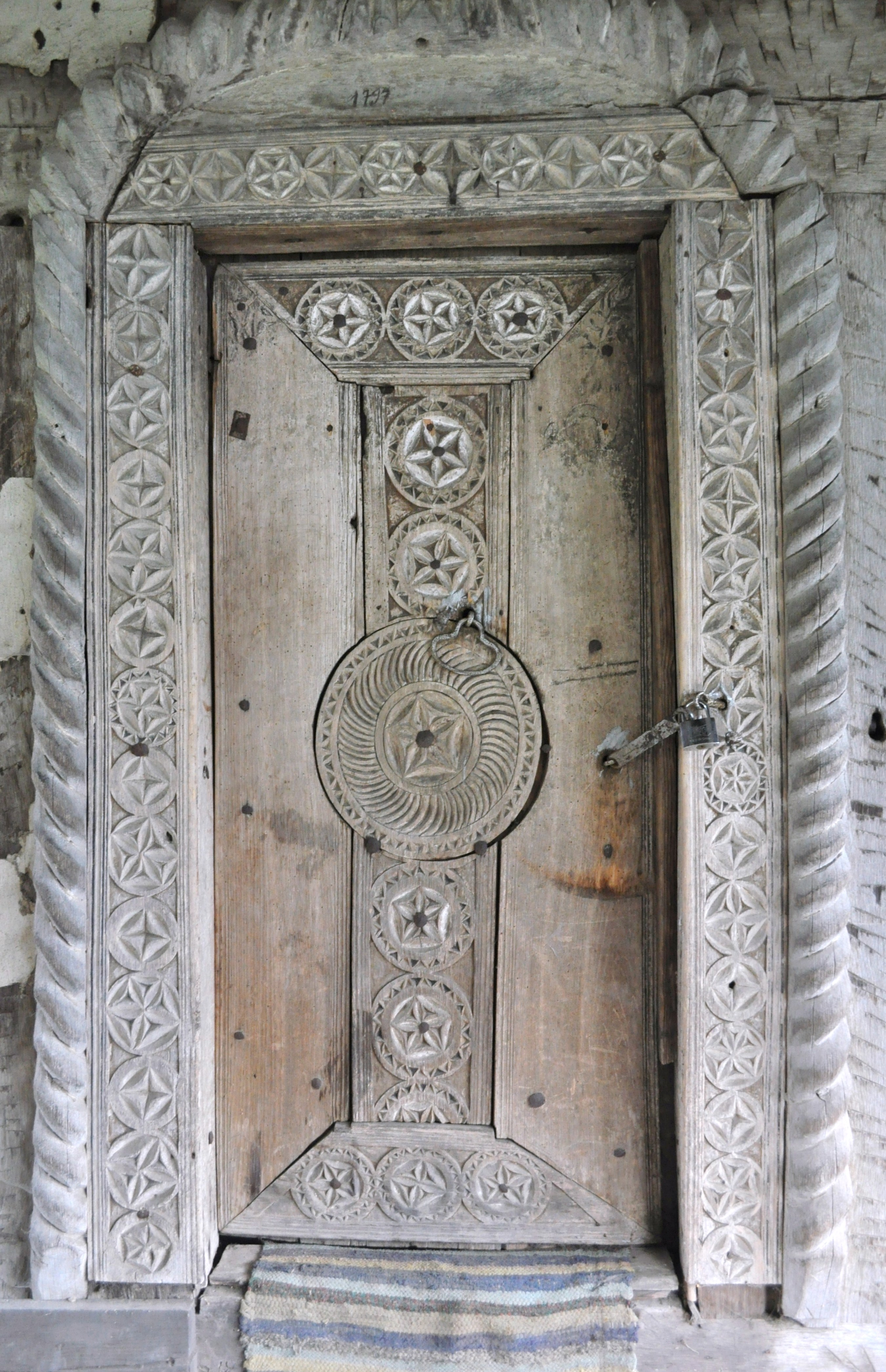 Biserica de lemn „Intrarea în Biserică a Maicii Domnului” din Crasna, județul Gorj